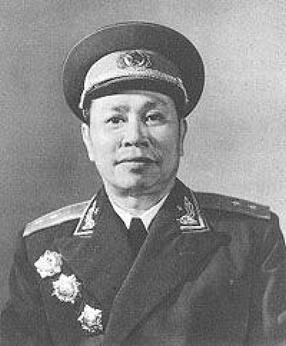 邱会作1955授衔照